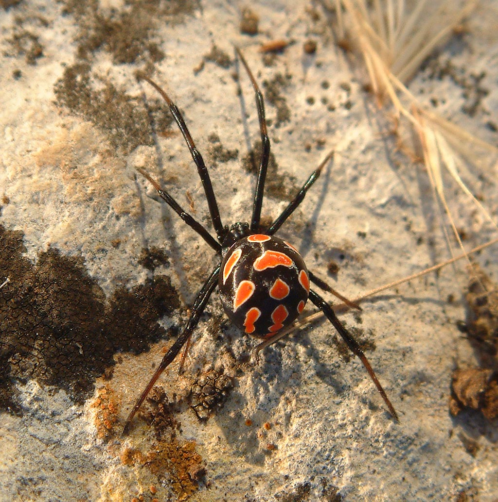 Hembra de Latrodectus tredecimguttatus, viuda negra europea Black widow spider, young female, Europe, Croatia, photo by K. Korlevic